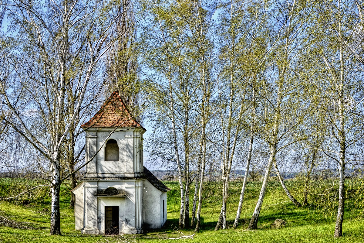 Kaplička Heřmanice